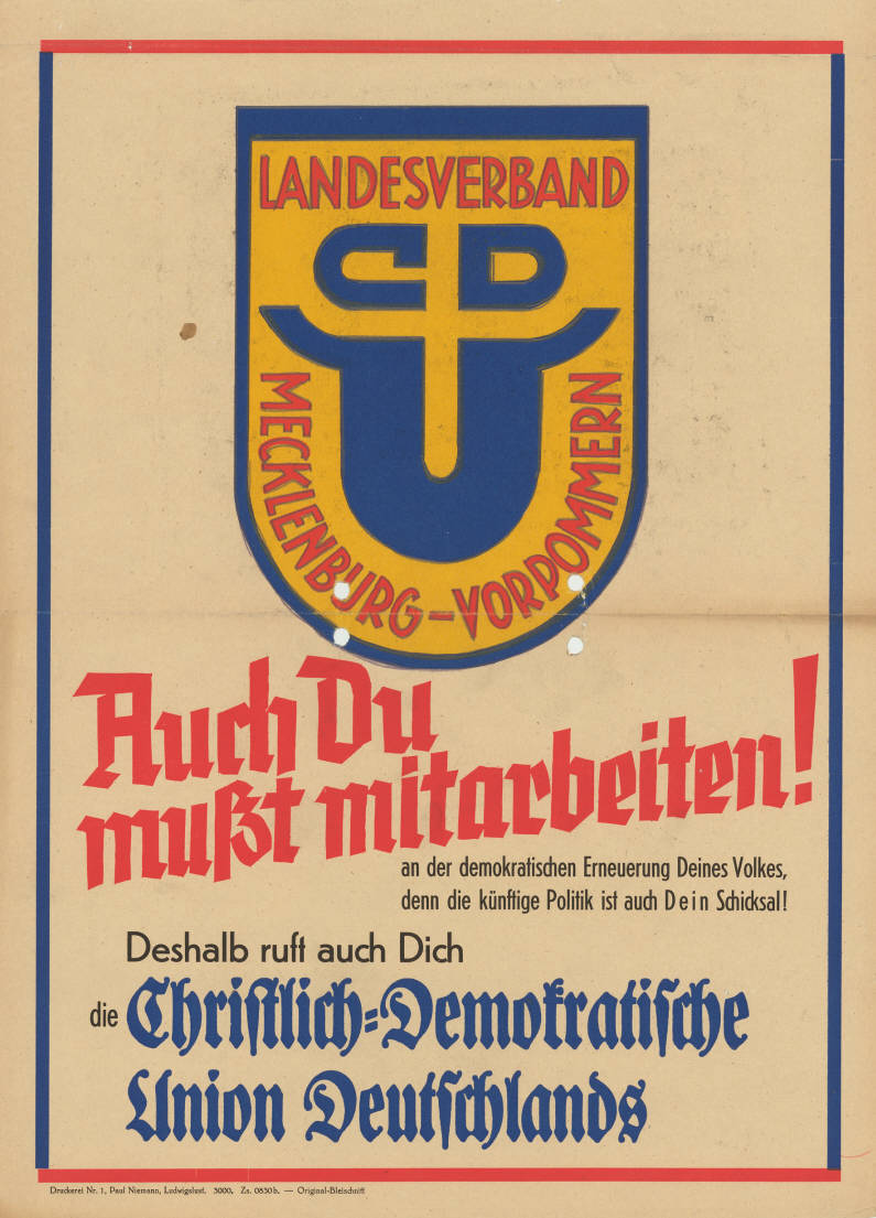 Landesverband CDU Mecklenburg-Vorpommern Auch Du mußt mitarbeiten! an der demokratischen Erneuerung Deines Volkes, denn die künftige Politik ist auch Dein Schicksal! Deshalb ruft auch Dich die Christlich-Demokratische Union Deutschlands Abbildung: Parteilogo des LV Mecklenburg-Vorpommern Kommentar: Plakat aus Ludwigslust, LV Mecklenburg-Vorpommern; vorderseitig beschriftet Plakatart: Textplakat Allgemein Auftraggeber: CDUD LV Mecklenburg-Vorpommern Drucker_Druckart_Druckort: Druckerei Nr. 1, Paul Niemann, Ludwigslust. 3000. Zs 0830b. - Original-Bleischnitt Objekt-Signatur: 10-024 : 3020 Bestand: Plakate aus der SBZ/DDR (10-024) GliederungBestand10-18: Ost-CDU / CDUD / Exil-CDU Lizenz: KAS/ACDP 10-024 : 3020 CC-BY-SA 3.0 DE